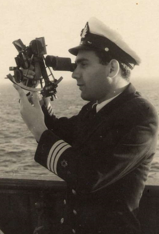 חובל ראשון אברהם אריאל מבצע תצפית כוכבים עם סקסטנט במשמרת 08:00-04:00 שנת 1957